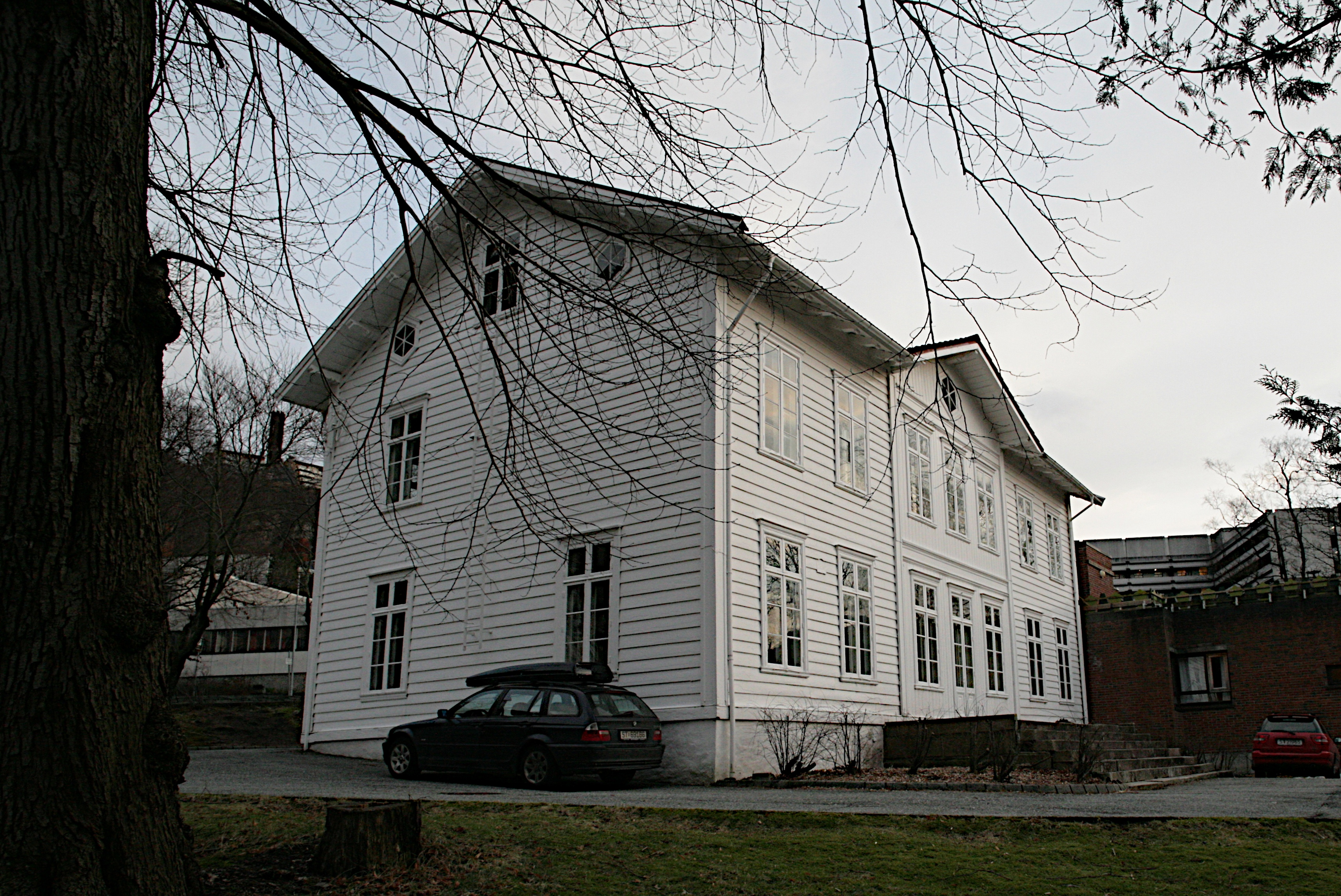 Det hvite hus, Haukelandsbakken 9